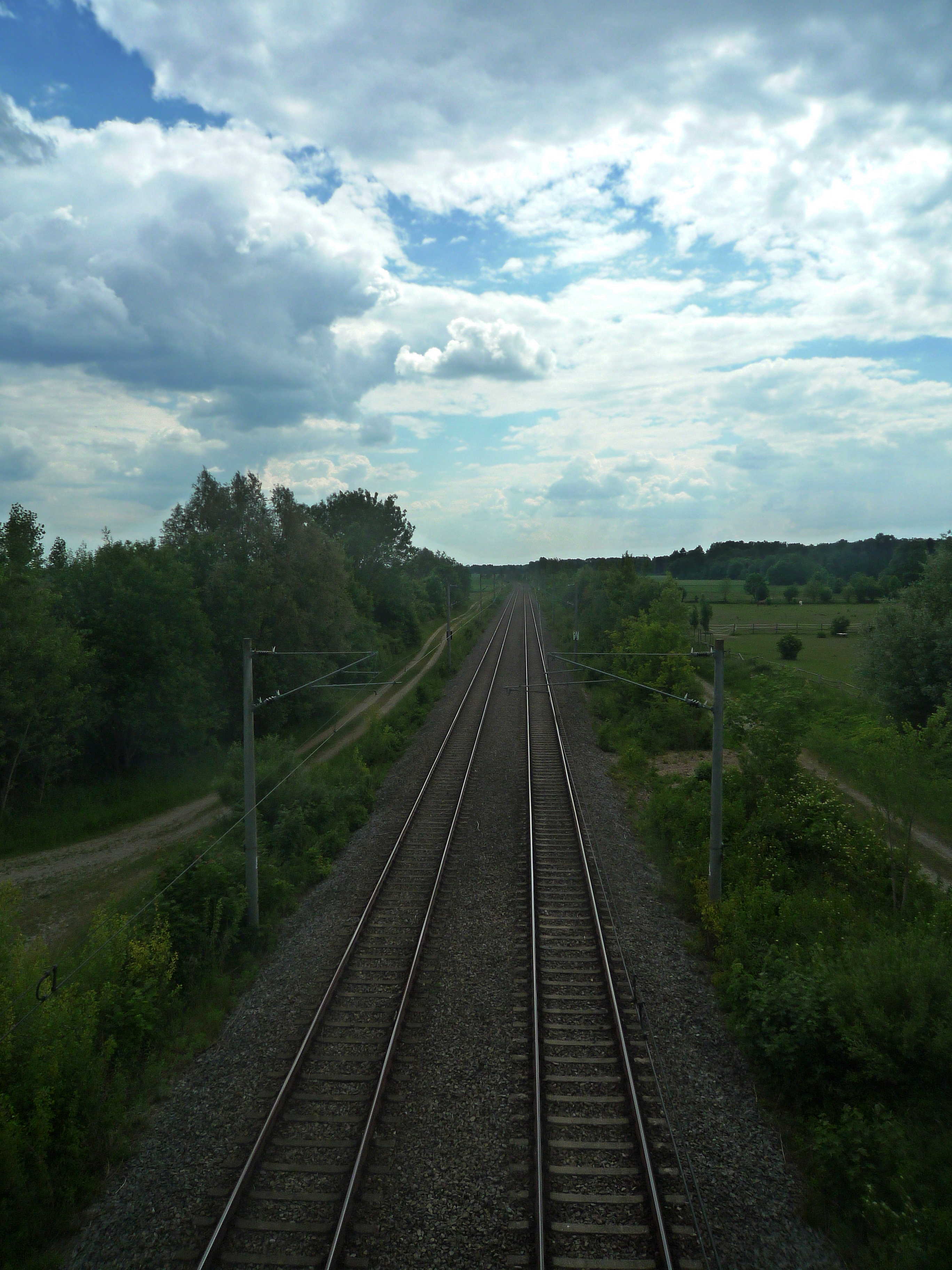 Bahnstrecke von München zum Flughafen München bei Hallbergmoos